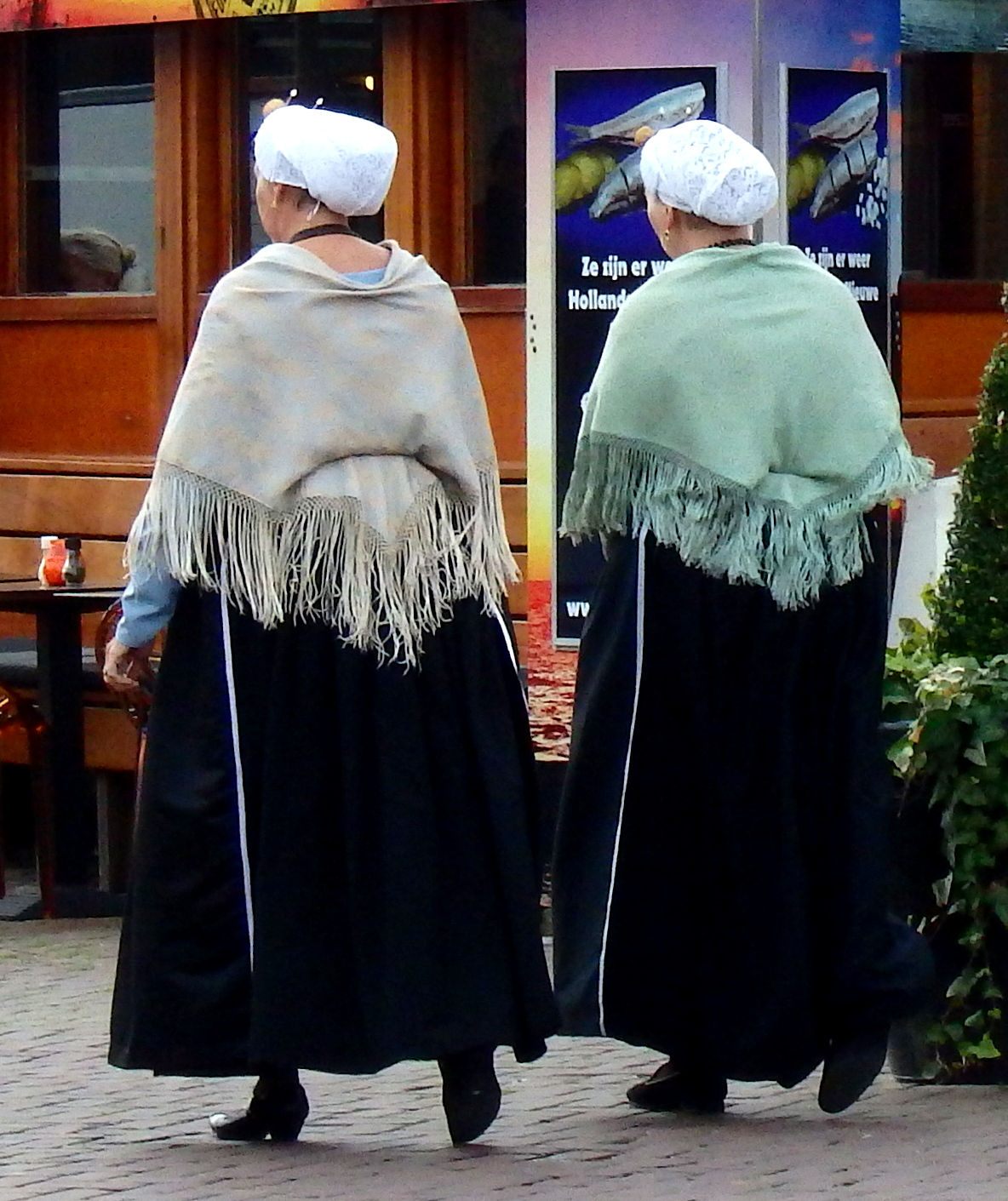 Twee vrouwen in klederdracht bij restaurant Simonis in Scheveningen